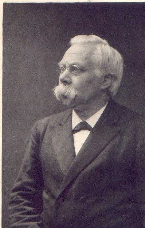 L.A.J. Burgersdijk, Sijthoff 4e druk